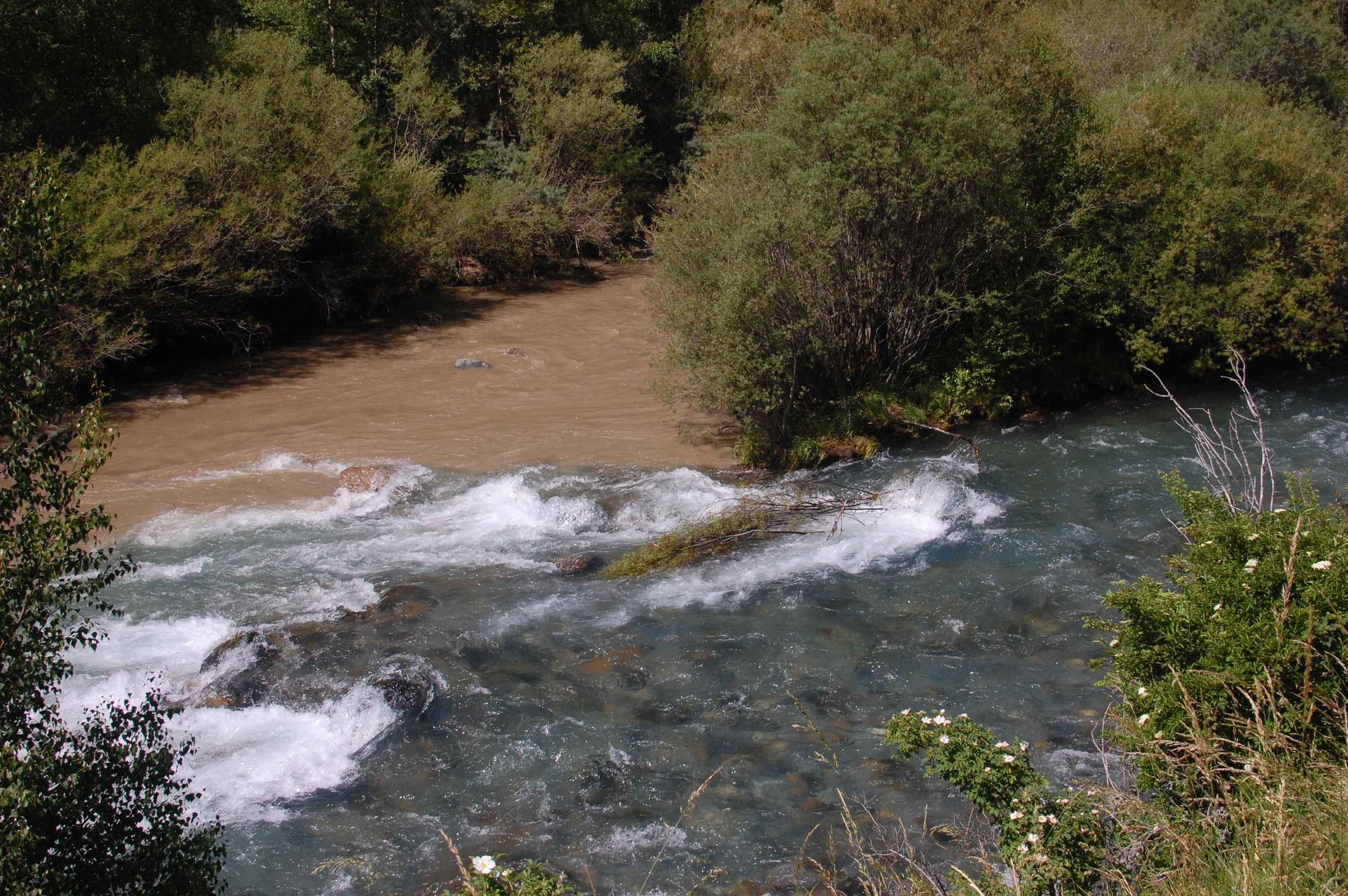 Aragonés: Forcallo Galligo-Gualempeda